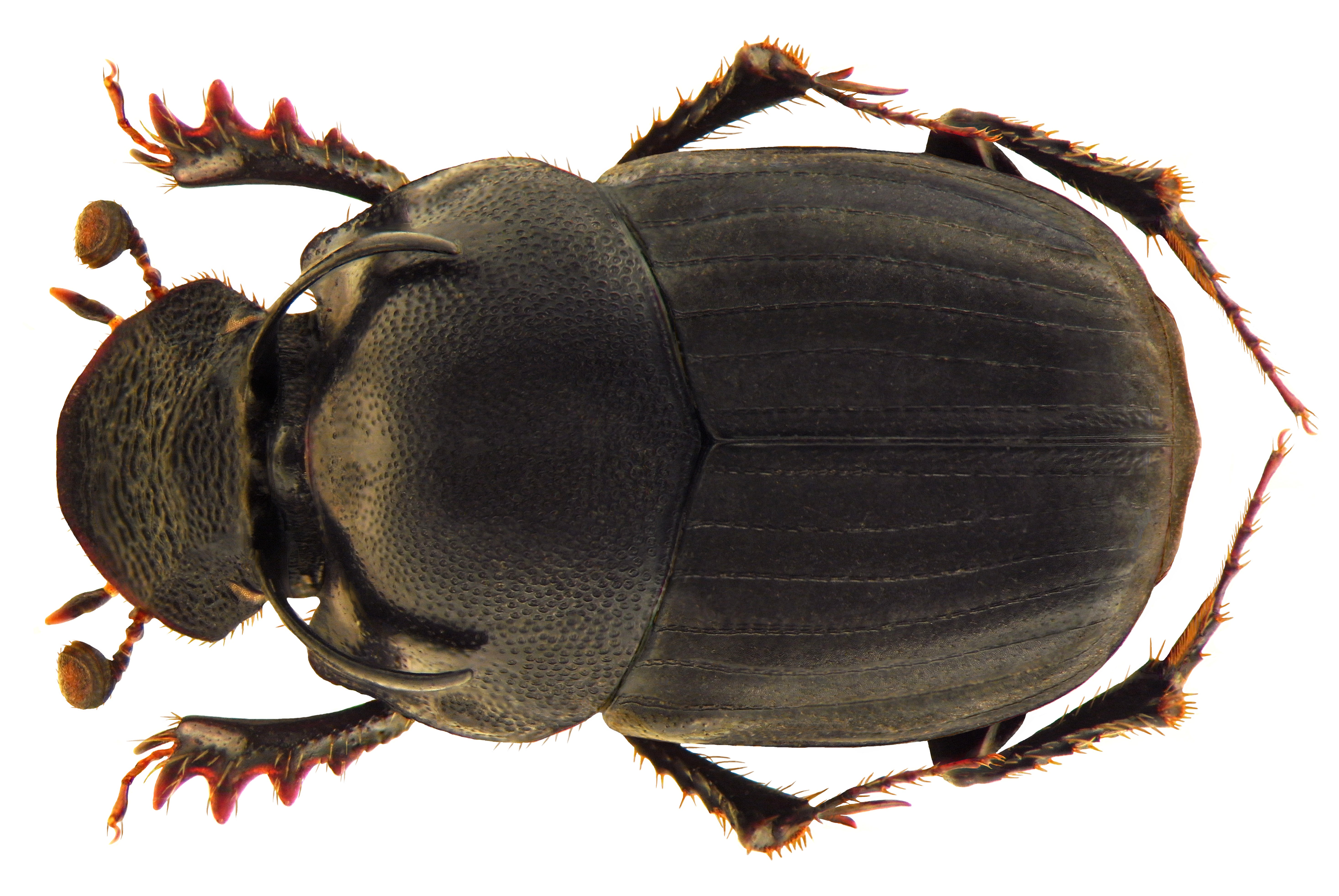 Familie: Scarabaeidae Groesse: 8,7 mm Fundort: Nepal, Bagmati, Sindhupalchok, Dubhachauer-Sarmatang, 1600-2500 m leg. M.Brancucci, 1989; det. J.Scheuern, 1990 Photo: U.Schmidt, 2010